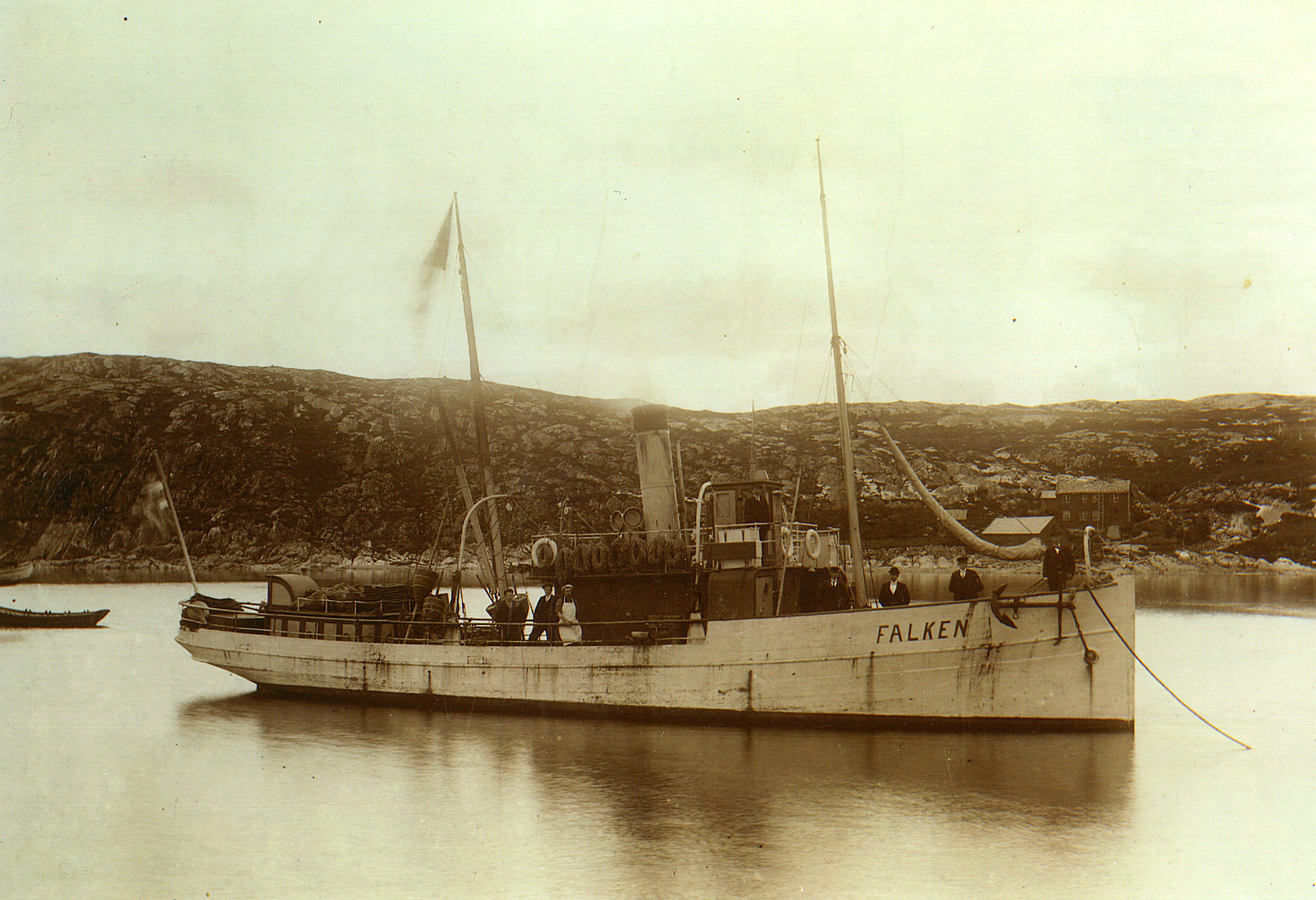 D/S "Falken" i Rørvik før 1910. "Falken" var det første fiskedampskipet som ble kjøpt i Namdalen (og Nord-Trøndelag). Båten ble bygd ved verftet Mjellem & Karlsen i Bergen i 1895 for Aksjeselskabet D/S Falken (overlevert i 1897): med blant andre viknaværingene Christian H. Ulsund, Rindul Horseng, Edvin G. Bondø, Hartvig G. Bondø, Godtvard Rostad, Lorents H. Gaasvær, Henrik L. Gaasvær, Hans Kaspersen Fornes og Henrik O. Olsvig som aksjeeiere.